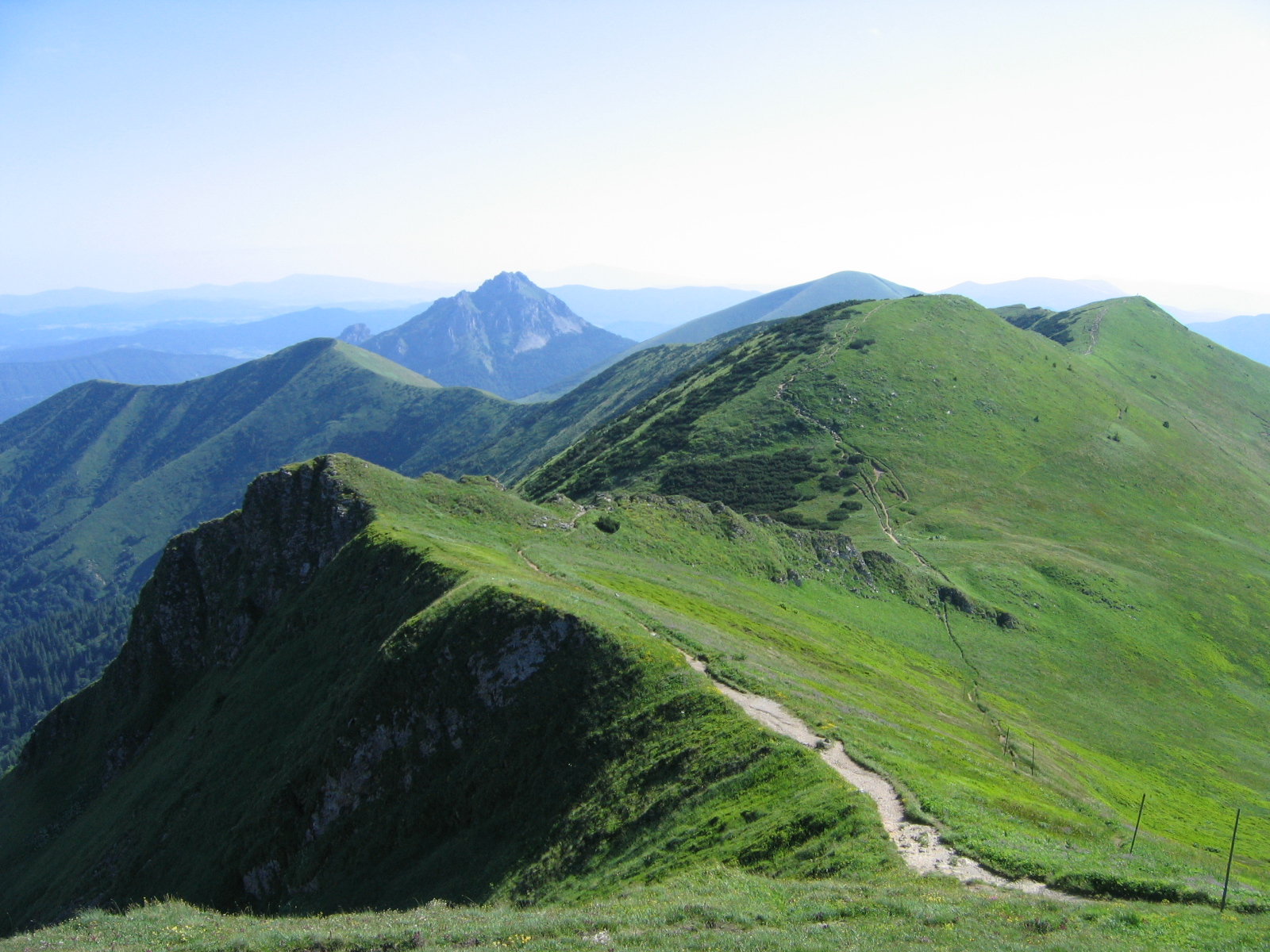 Hlavný hrebeň Krivánskej časti Malej Tatry, Slovensko. V popredí Hromové, Steny, Poludňový Grúň (úplne vľavo), v pozadí takmer zakrytý Stoh a Veľký Rozsutec